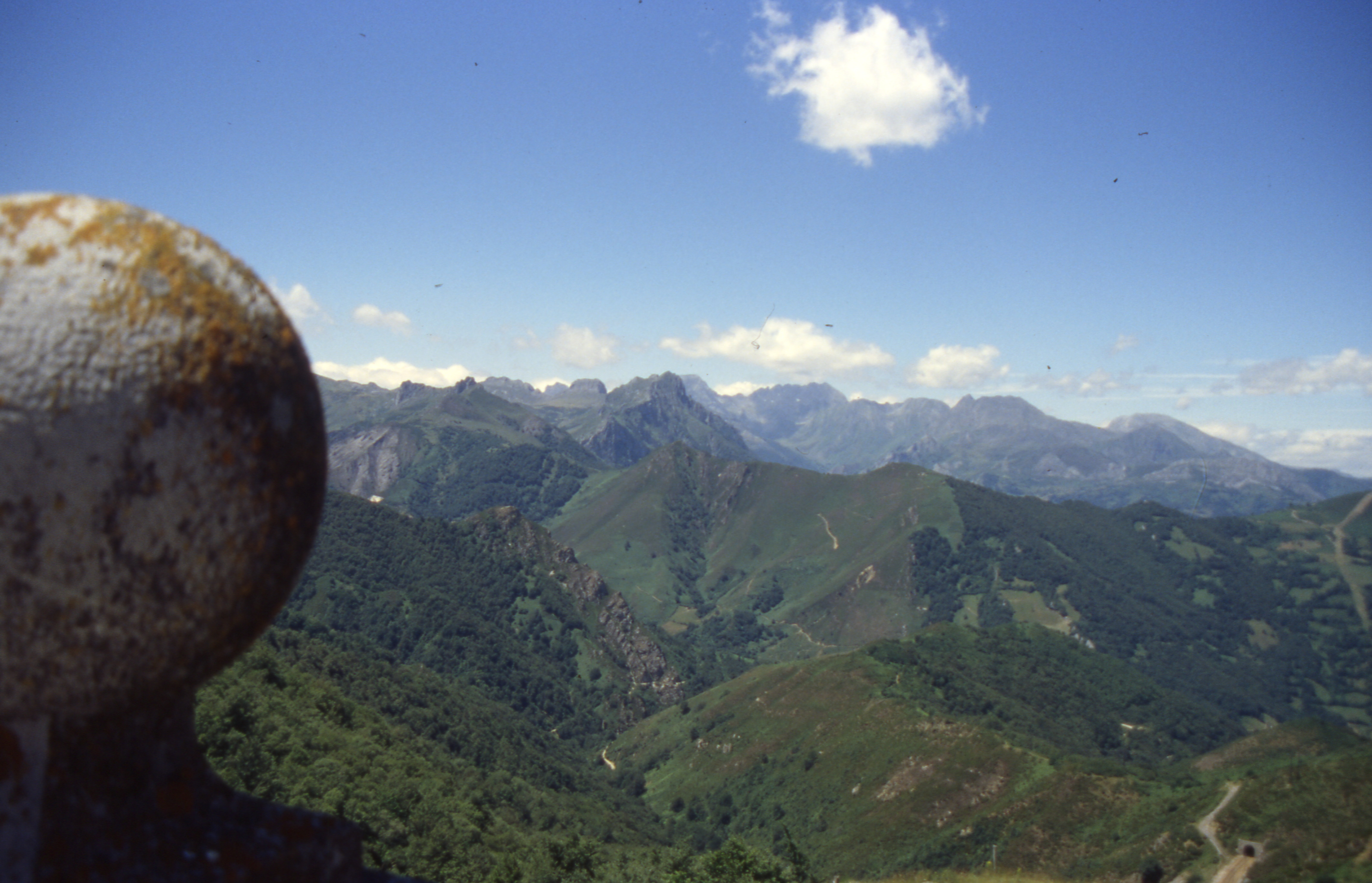 Ansicht